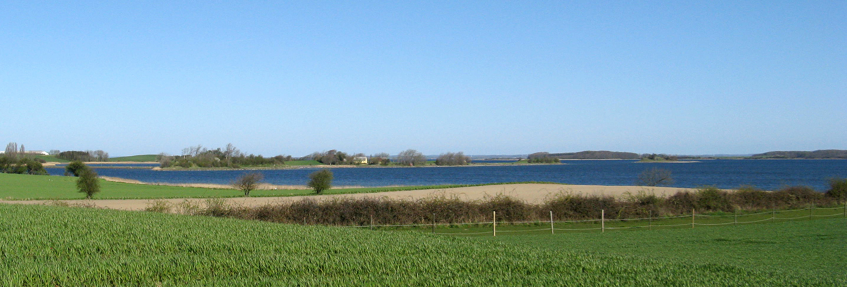 'Dansk: Lindelse Nor på Langeland, med øen Langøen: Lindelse Nor and Langø on Langeland, in Denmark